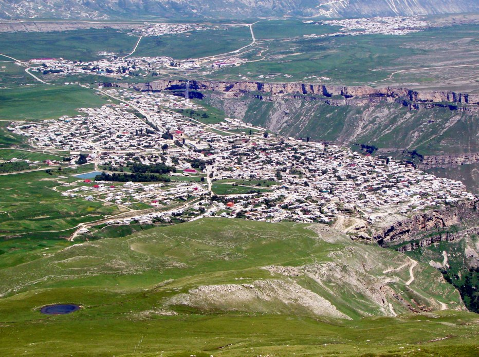 село Хунзах